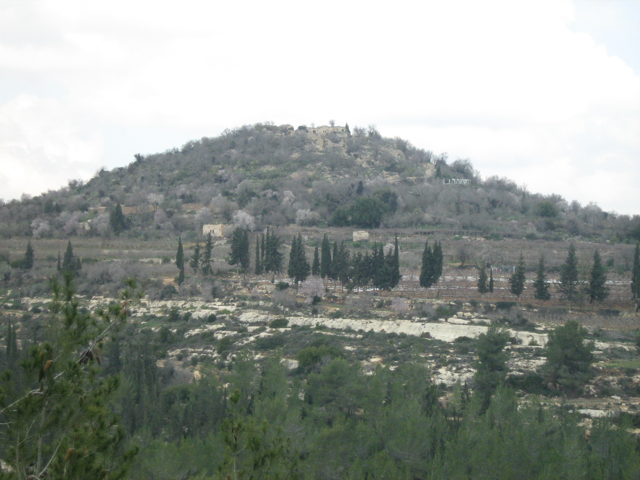 הר צובה מדרום